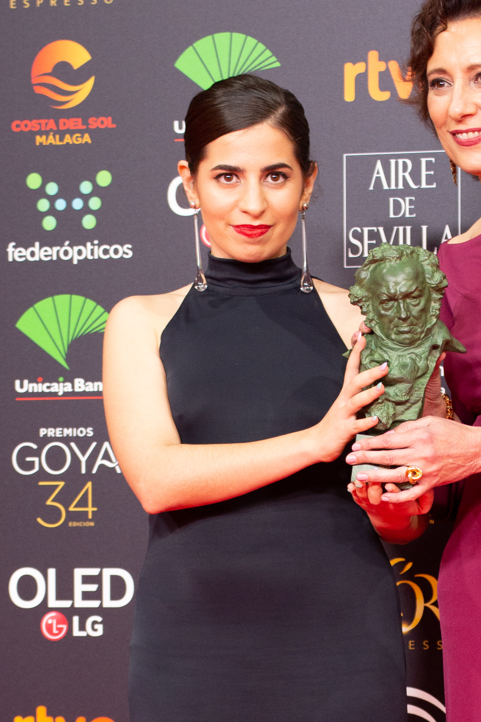 Irene Moray premiada por el corto Suc de Síndria en la ceremonia de los Premios Goya 2020 celebrada en Málaga